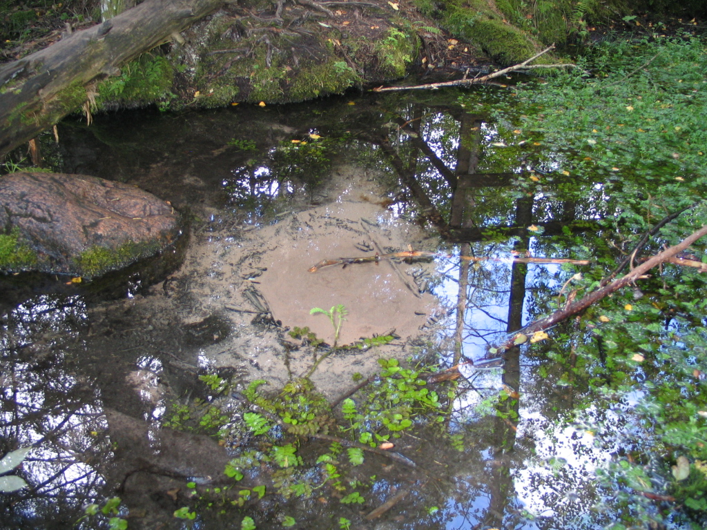 Odalätsi allikad Kihelkonna vallas